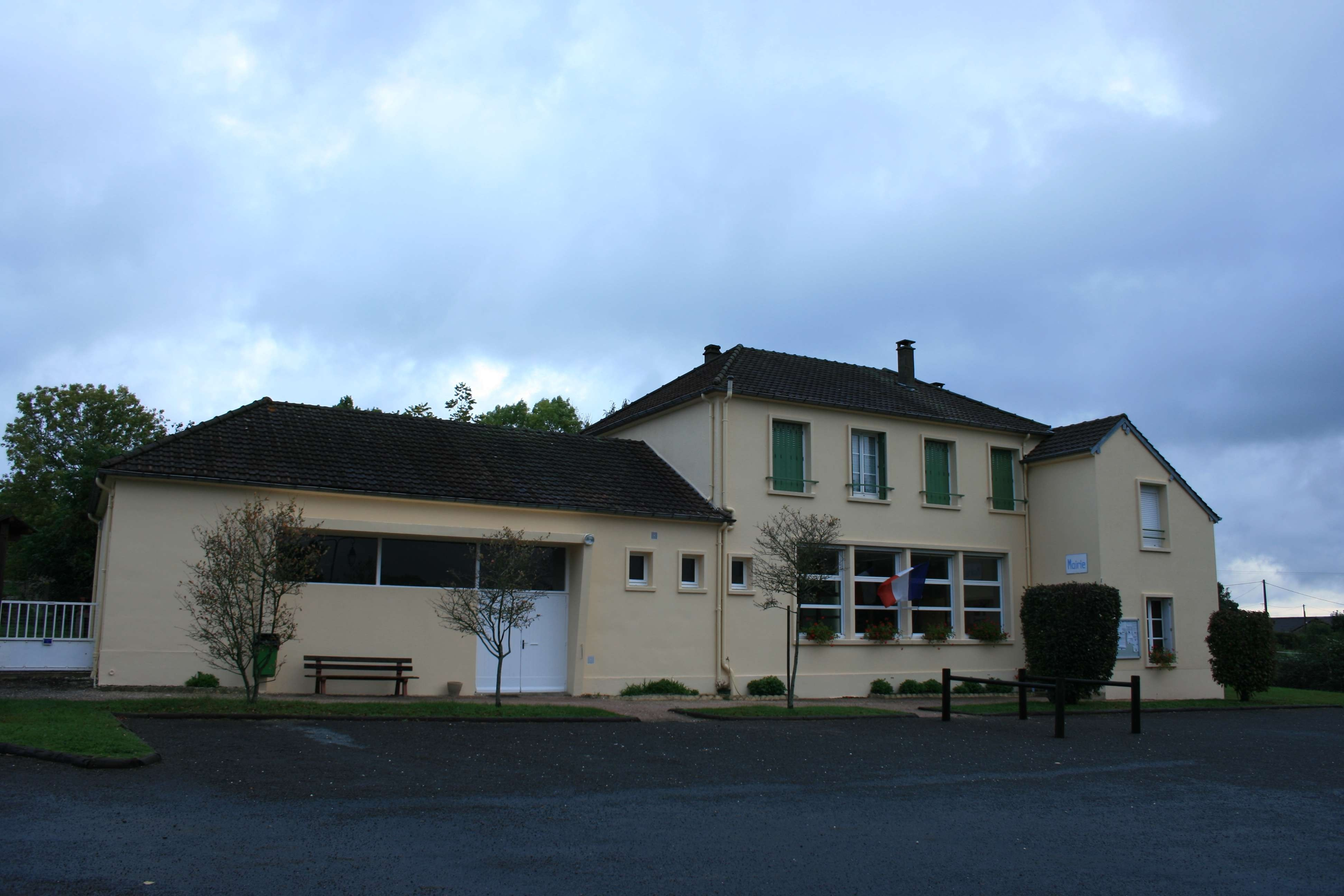 Mairie du Cercueil (Orne).